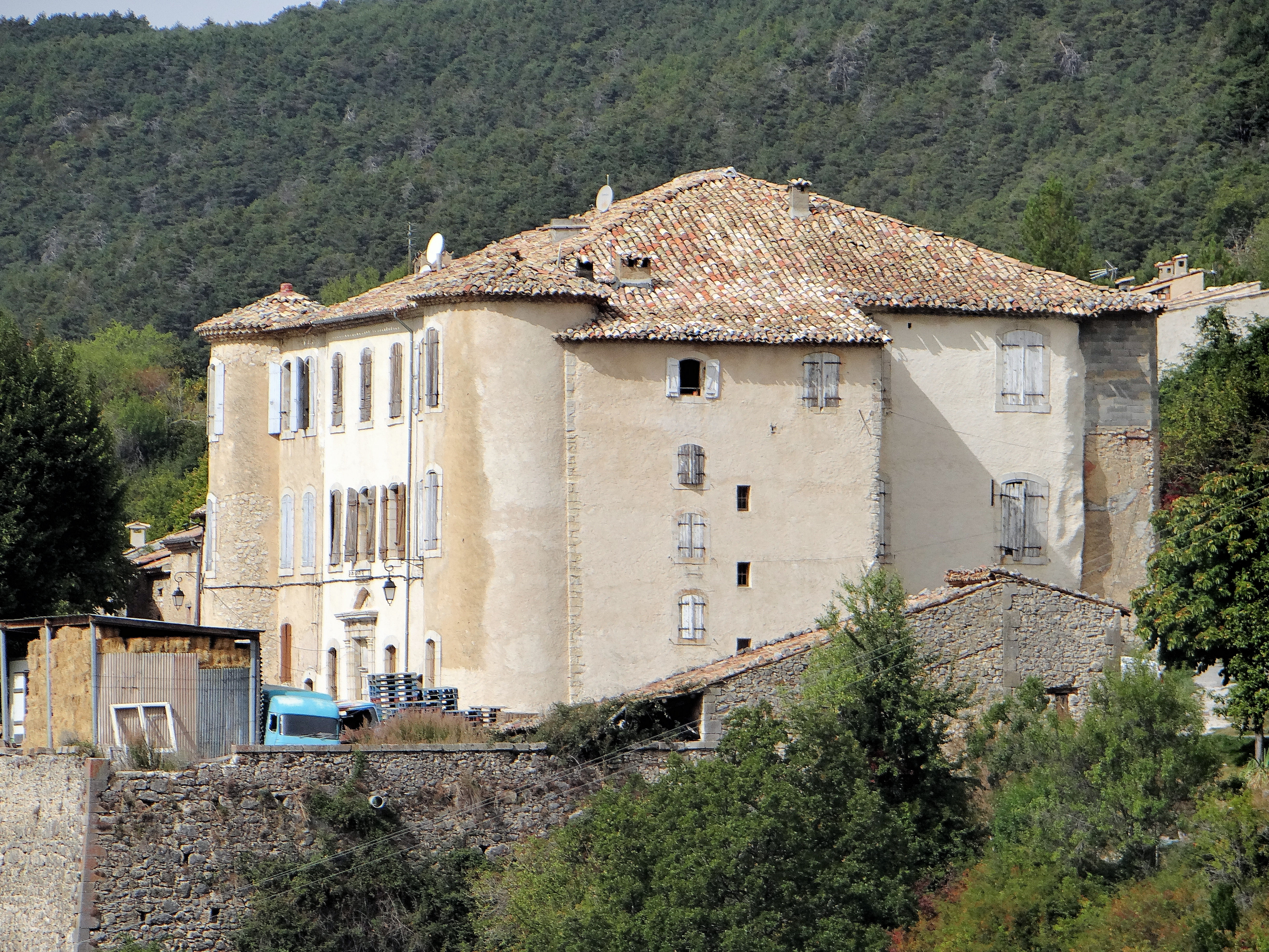 Castellane - Château d'Éoulx - Ensemble